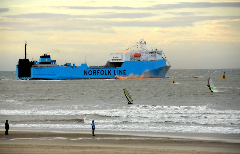 Laatste tocht van de Maersk Anglia van de Norfolk Line van Scheveningen naar Great Yarmouth. Vanaf vandaag, 25 november 2006, is de Nederlandse thuishaven Vlaardingen. IMO Number: 9186649 MMSI Number: 244885000 Callsign: PCFJ Length: 143 m Beam: 23 m